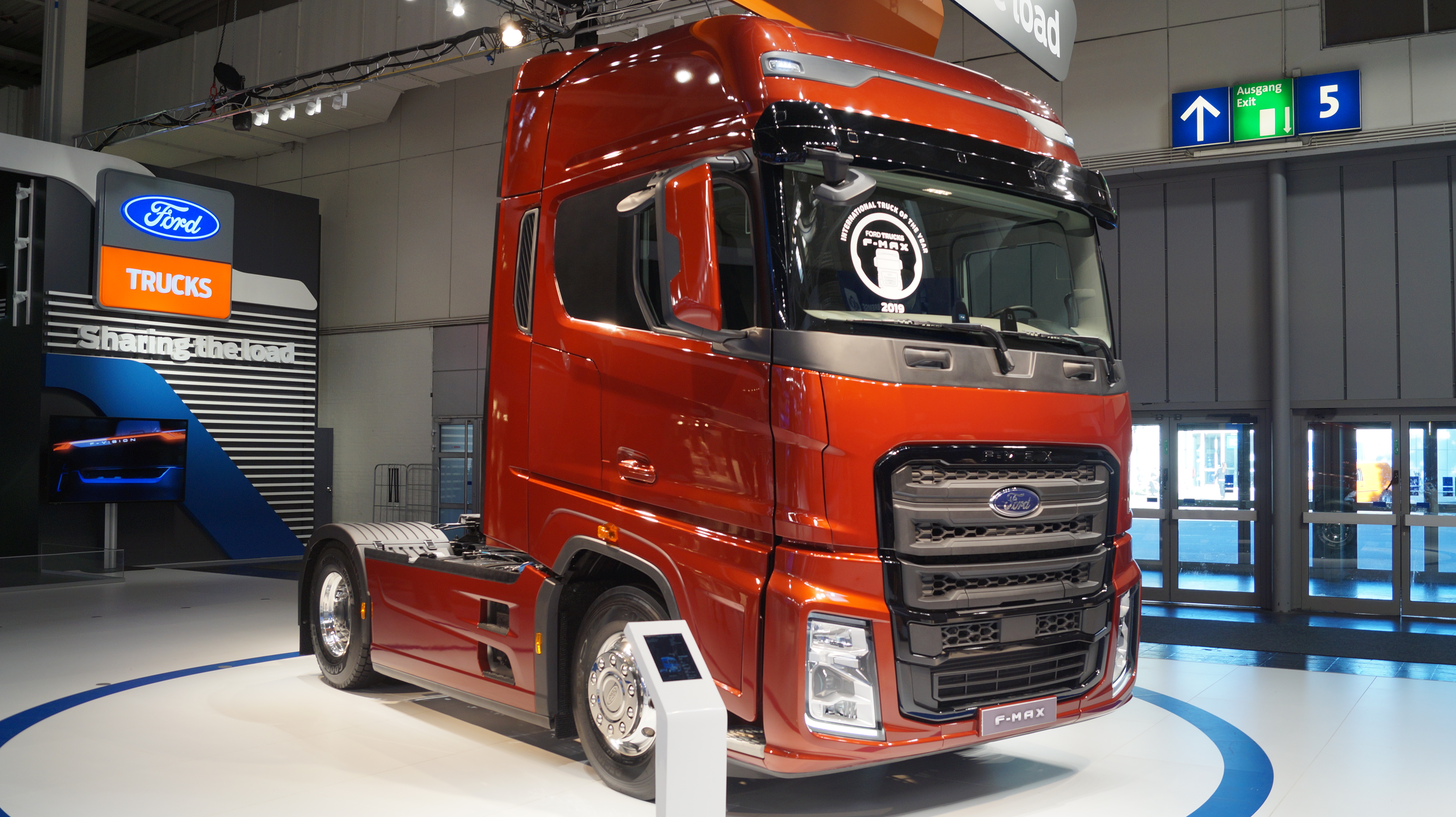 Schrägansicht der Front eines Ford F-MAX in der Metalliclackierung Red Rush, ausgestellt auf der IAA 2018.